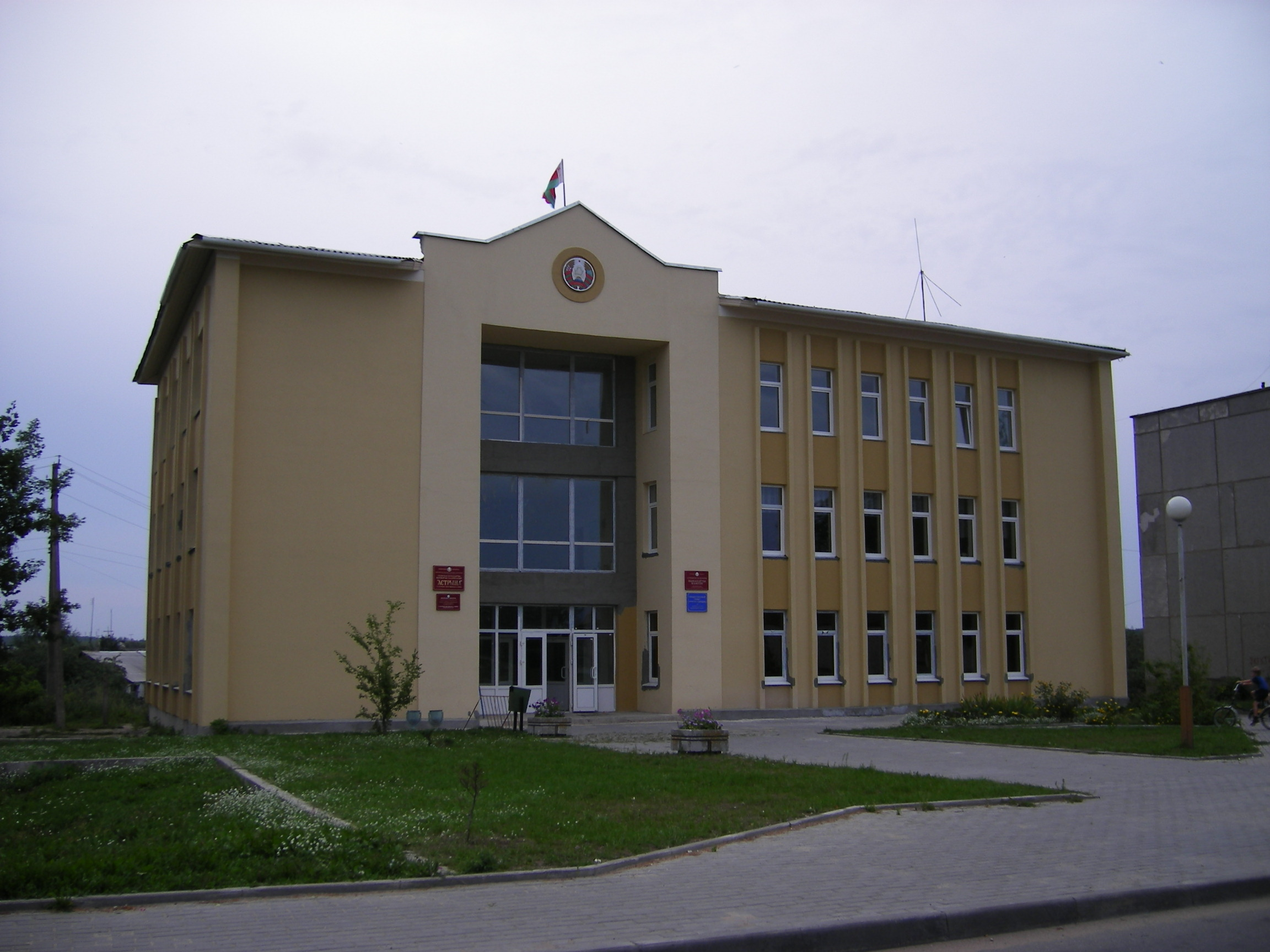 Astryna (Hrodna Oblast)